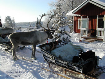 Renne photographié en Laponie finlandaise. Février 2004